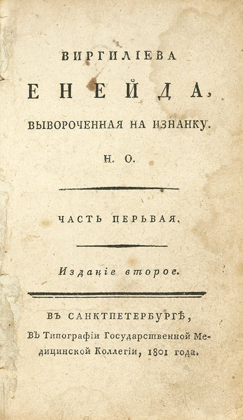 Николай Осипов. «Виргилиева Энеида, вывороченная наизнанку». Часть первая, издание второе. 1801 год, Санкт-Петербург